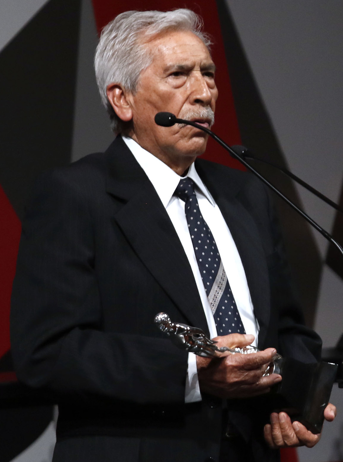 Martes 11 de julio de 2017. En el Palacio de Bellas Artes, se realizó la ceremonia número 59 de la entrega de Premios de la Academia Mexicana de Cinematografía, Ariel. Encabezado por su presienta la actriz Dolores Heredia. MEJOR ACTOR Empate, José Carlos Ruiz por Almacenados. Fotografía: Milton Martínez / Secretaría de Cultura CDMX.